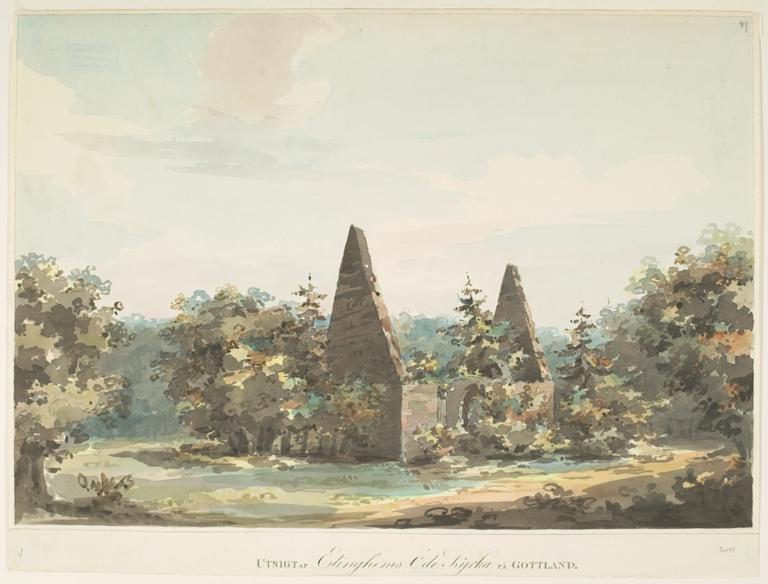 RAÄ-nummer Hangvar 4:1. Akvarellerad teckning från 1807 av Jacob Wilhelm Gerss. Motiv: Hangvar 4:1 Nyckelord: Riksintressen Kategori: Akvarell, Kyrka/kapell RAÄ-nummer Hangvar 4:1. Akvarellerad teckning från 1807 av Jacob Wilhelm Gerss. Hangvar 4:1.